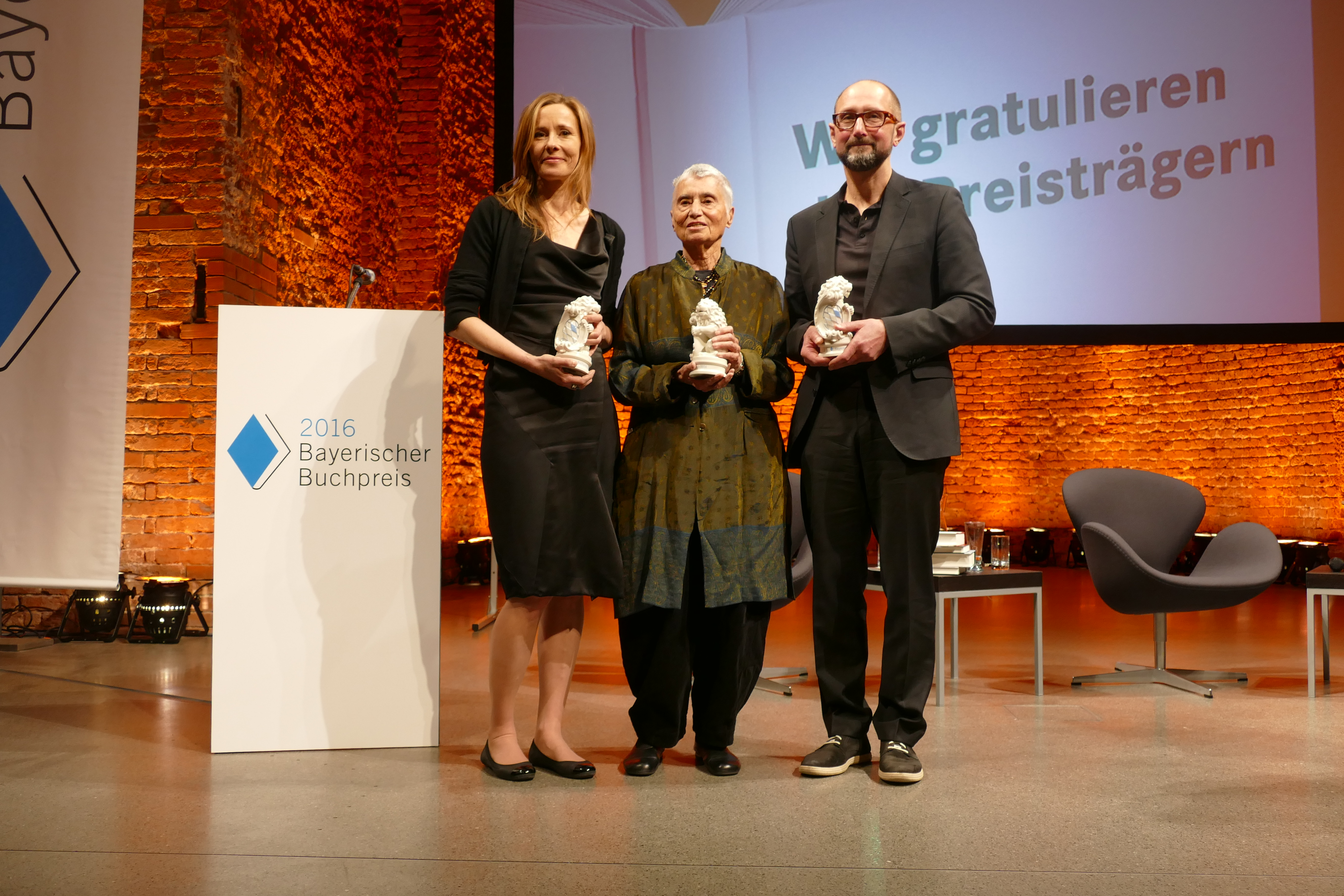 Preisträger des Bayerischen Buchpreises 2016: von links: Andrea Wulf, Ruth Klüger, Heinrich Steinfest